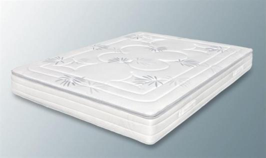 Colchón viscoelástico de fabricación española